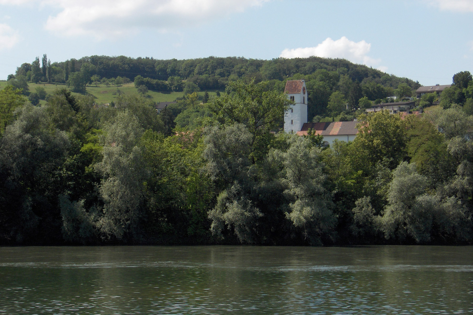 Umiken: Blick auf das Dorf vom Südufer der Aare aus (Altenburg) Fotografiert durch Voyager, 28. Juni 2006